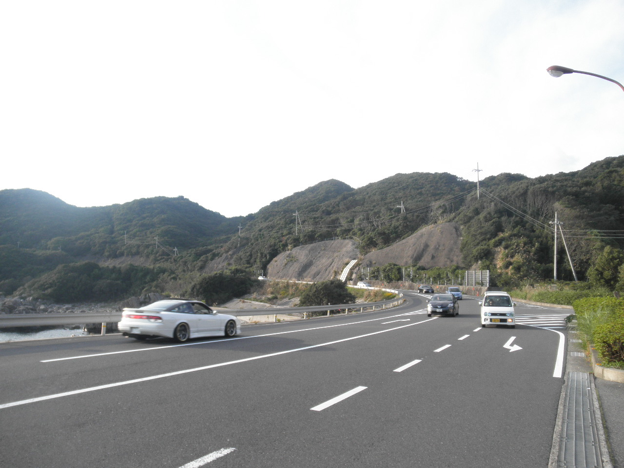 和歌山県西牟婁郡すさみ町見老津 国道42号